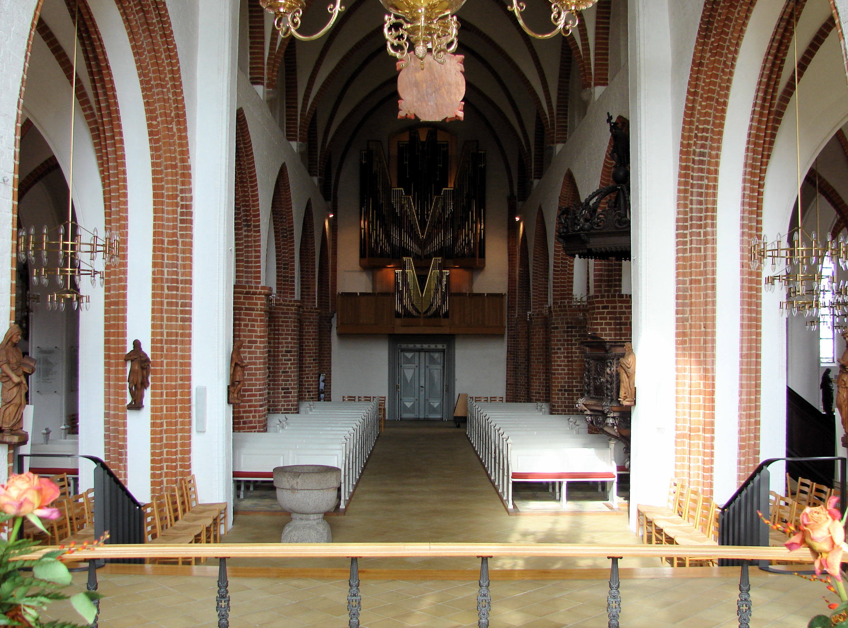 Vor Frue Kirke, Nyborg, Fyn